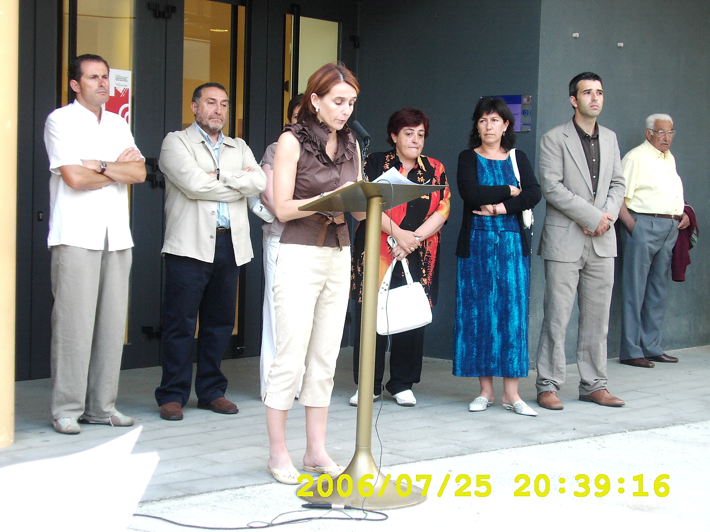 Inauguración do Auditorio Hernán Naval en Ribadeo Na foto aparecen, entre outros, dous alcaldes de Ribadeo: Fernando Suárez Barcia e Balbino Pérez Vacas. Publicada por vez primeira en